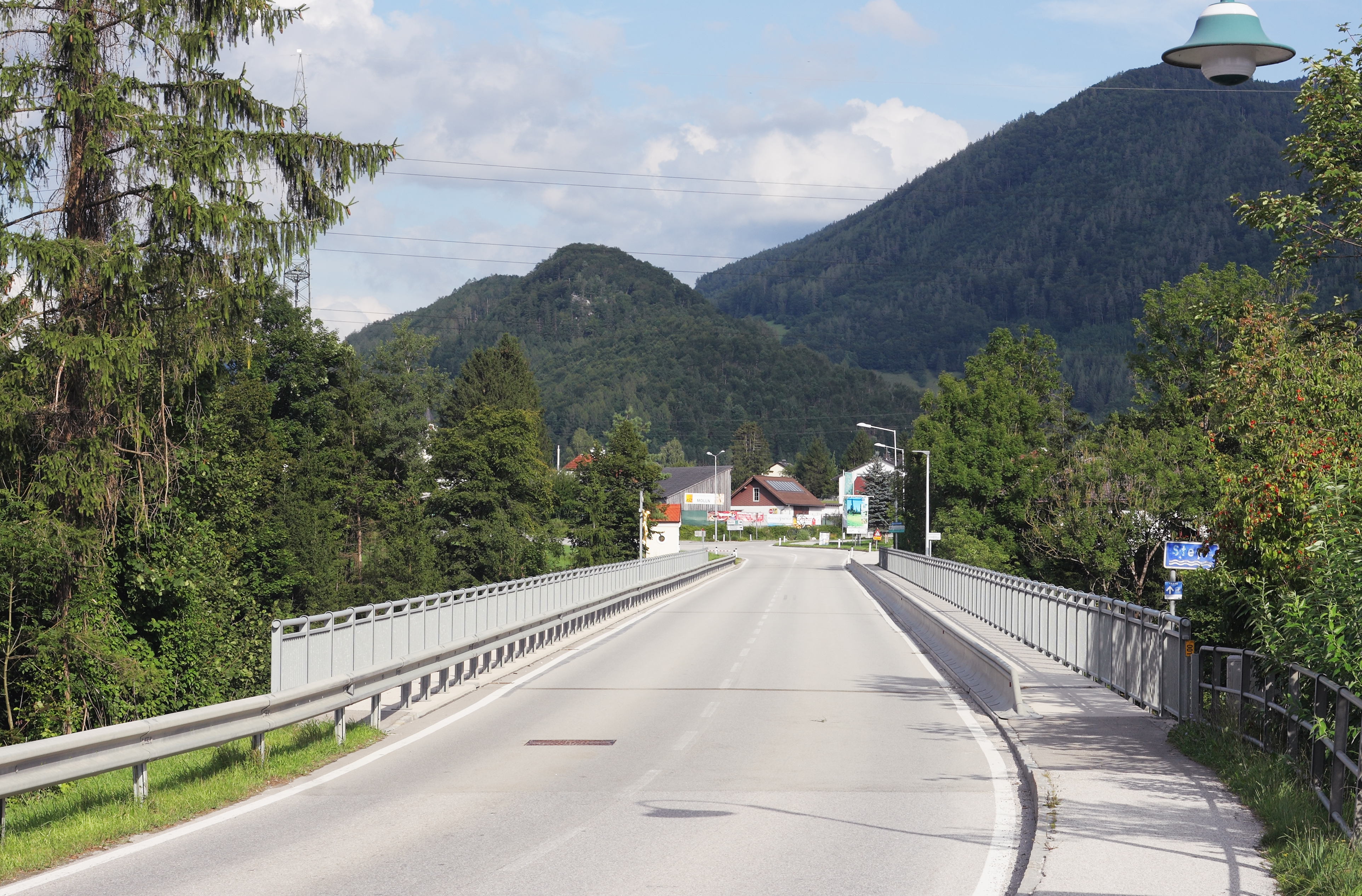 Die Stefaniebrücke der Mollner Straße (L 1325) über die Steyrschlucht. Blick von Leonstein nach Molln. Das Bild zeigt das Aussehen nach der Generalsanierung 2014.